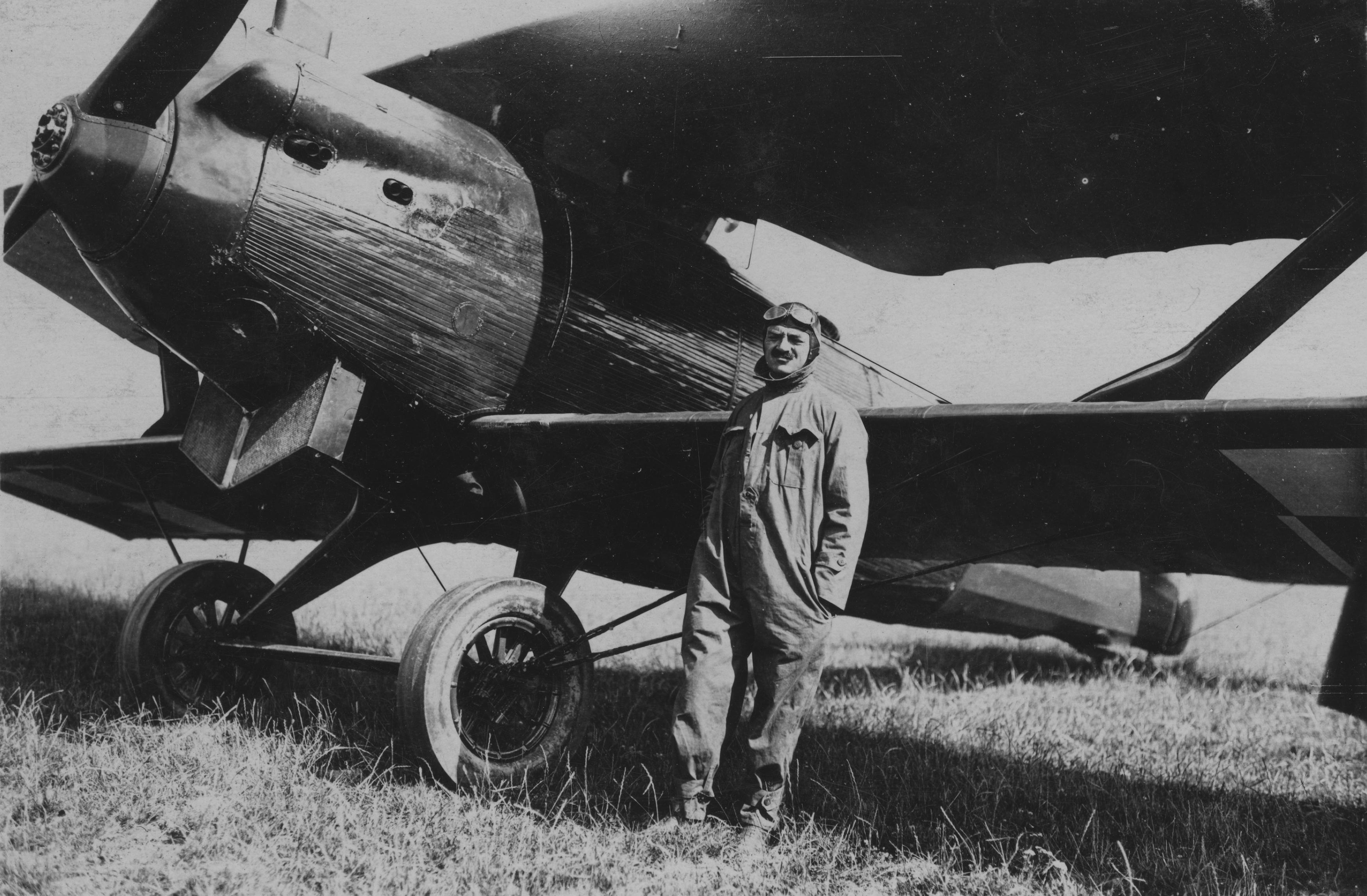 Gen. Włodzimierz Zagórski na lotnisku rakowickim, w drodze powrotnej do Warszawy z wizyty polskich lotników wojskowych w Hiszpanii. W tle samolot Breguet XIX.